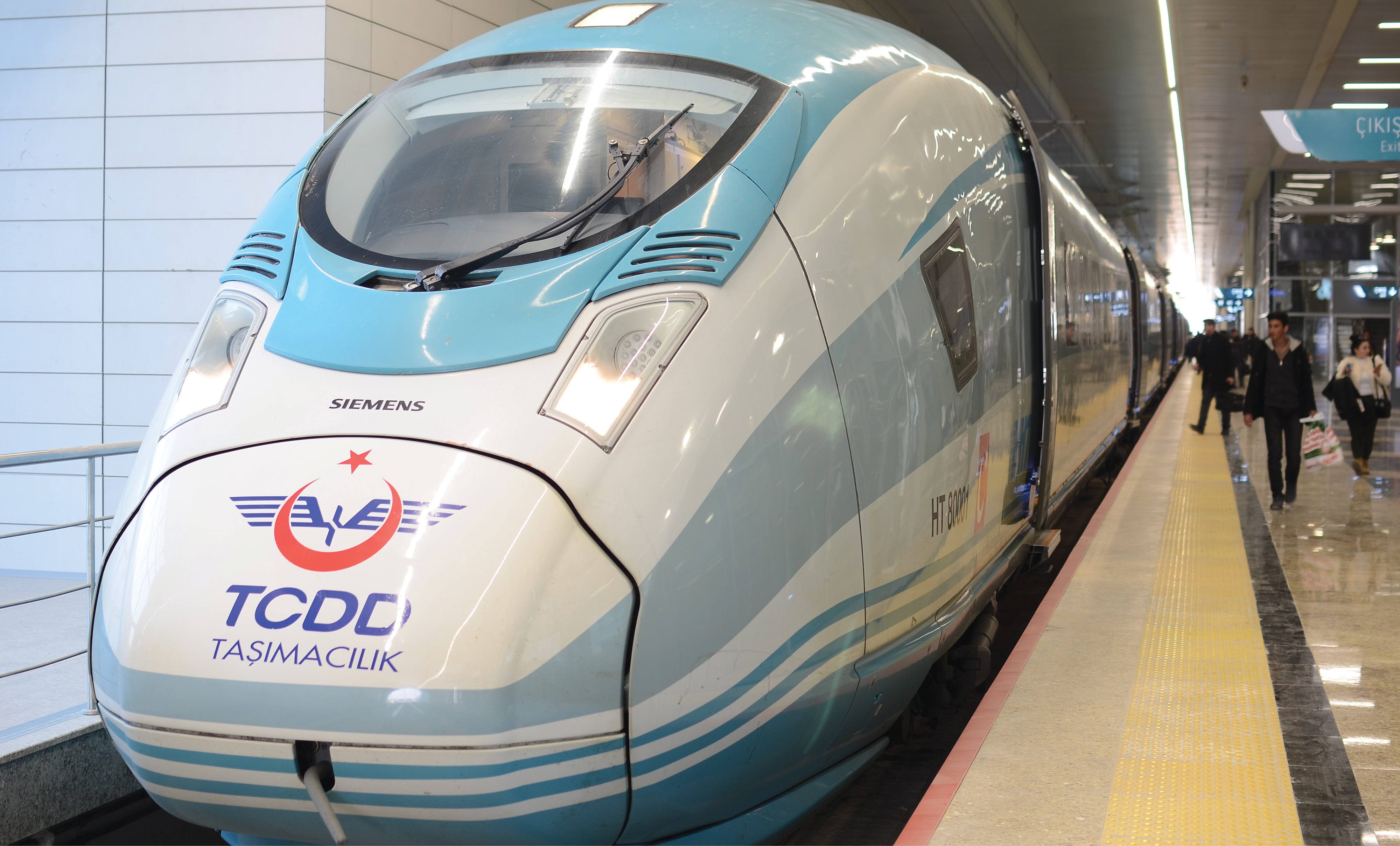 Ortalama 300km/saat hızlı HT80000 treni